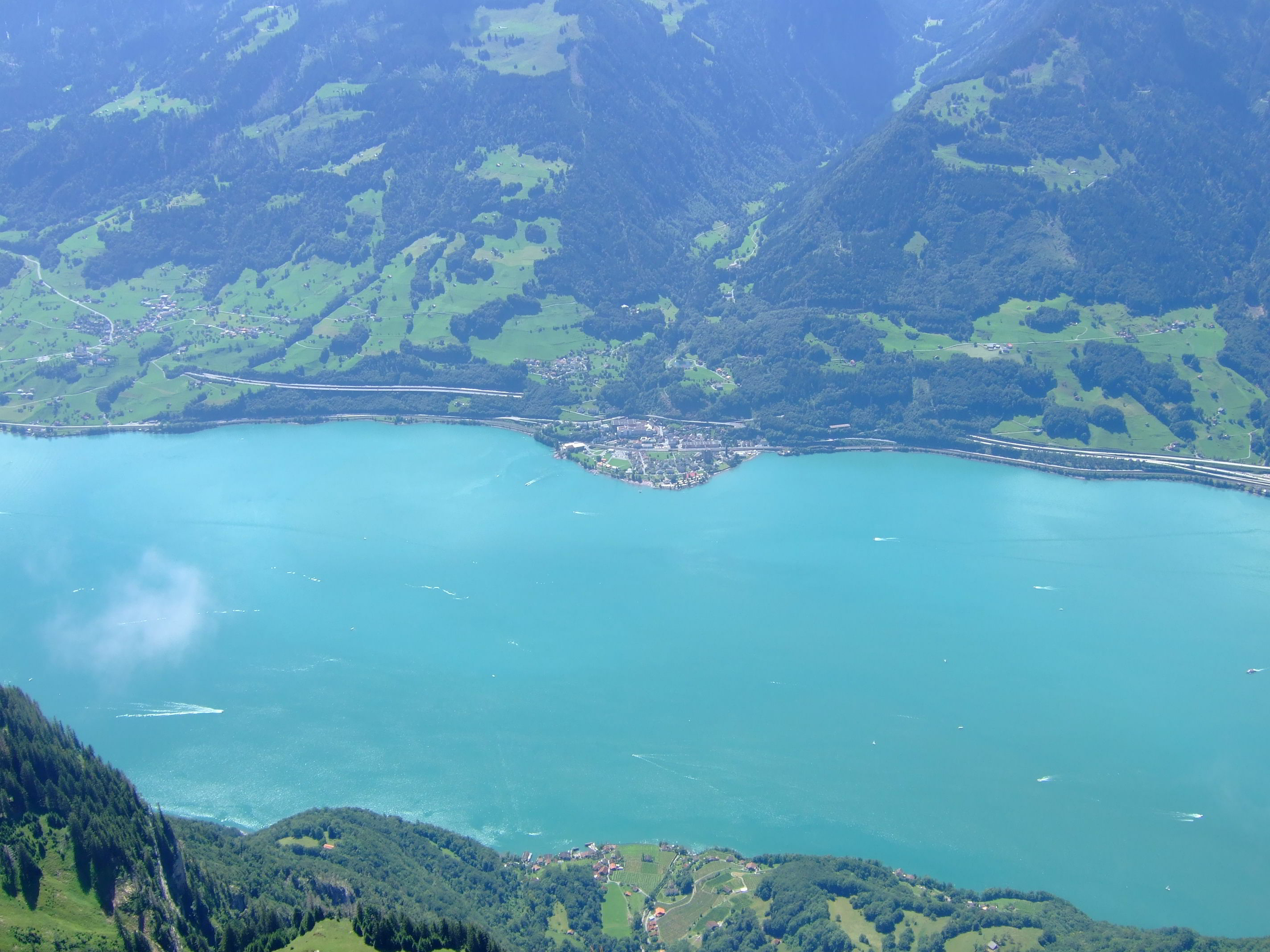 Blick auf Quinten und Murg (Gemeinde Quarten, Kanton St. Gallen, Schweiz) vom Leistkamm